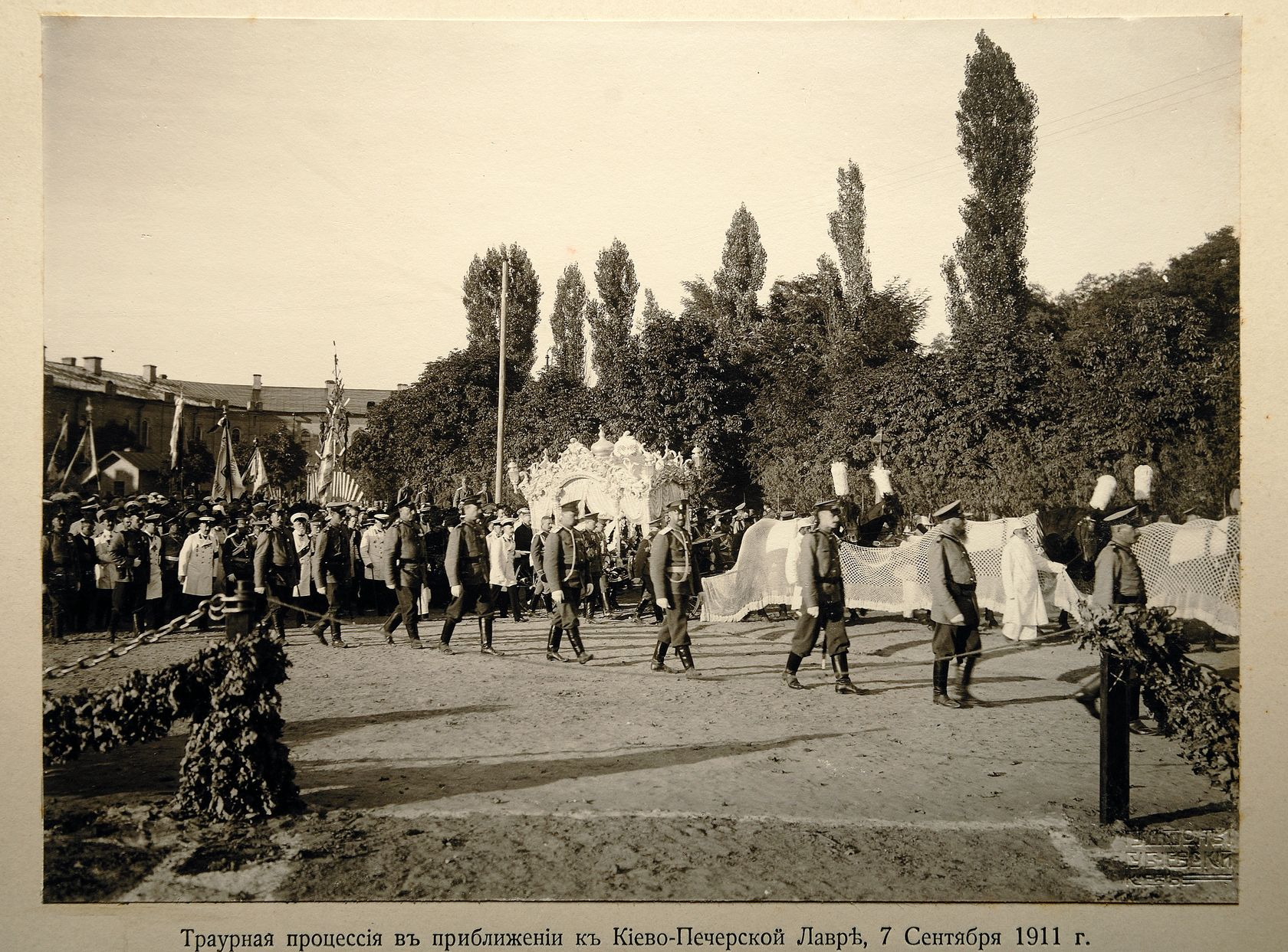 Киев. Траурная процессия с телом Столыпина П.А., направляющаяся в Киево-Печерскую Лавру. Сент.1911г.